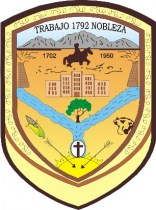 Escudo de Santa Rosalia de Camargo